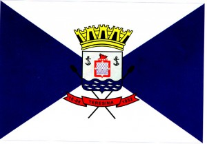 Bandeira do município brasileiro de Teresina, capital do estado de Piauí.